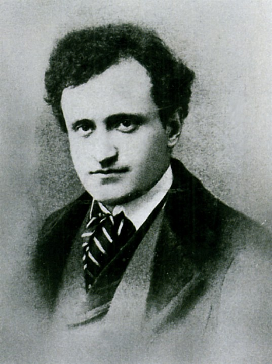 Federigo Tozzi giovane